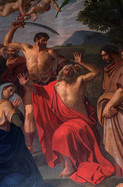 "le martyre de Saint Pons", tableau du peintre niçois Joseph Castel (1798-1853) exposé au-dessus du maître autel de l'église de l'ancien monastère Saint-Pons (actuellement paroisse Saint-Pons)